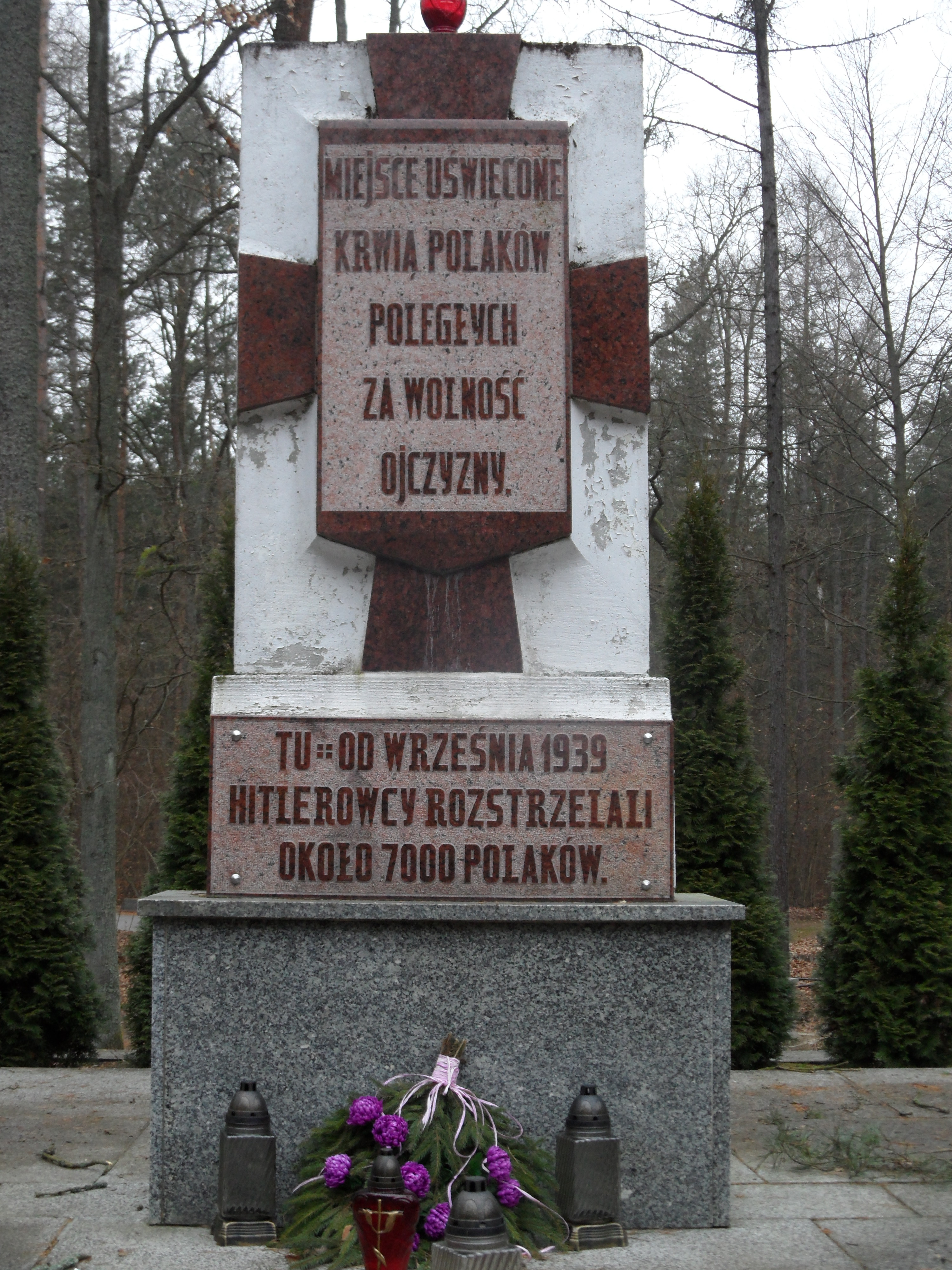 Pomnik upamiętniający pomordowanych przez hitlerowców w Szpęgawskim lesie